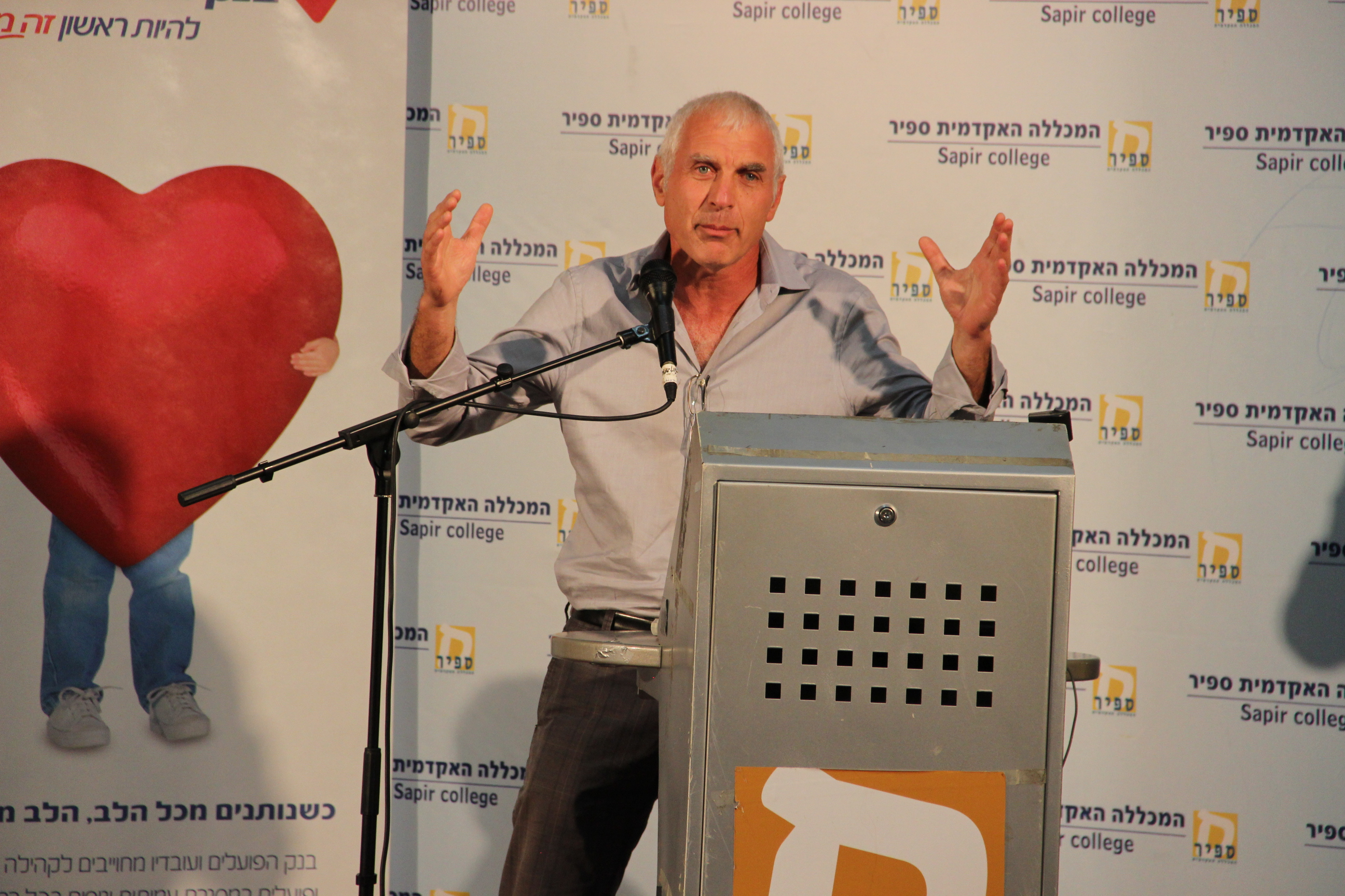 חיים ילין בכנס שדרות לחברה במכללה האקדמית ספיר ובעיר שדרות 2015